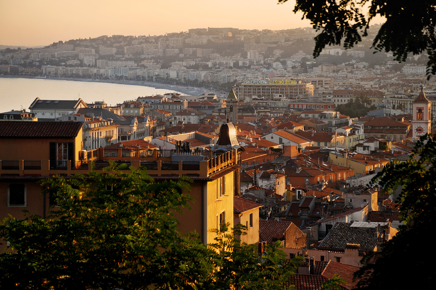 Ницца, Франция. Вид на старый город